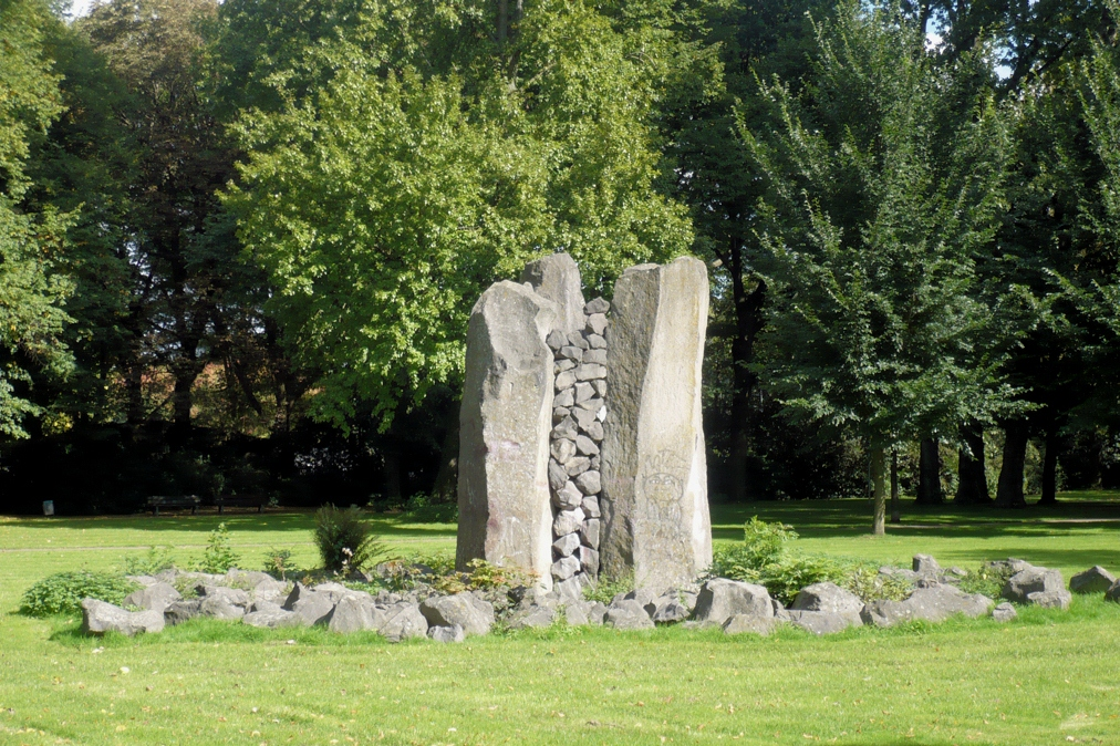 Kunst im Kaiser-Wilhelm-Park in Essen-Altenessen